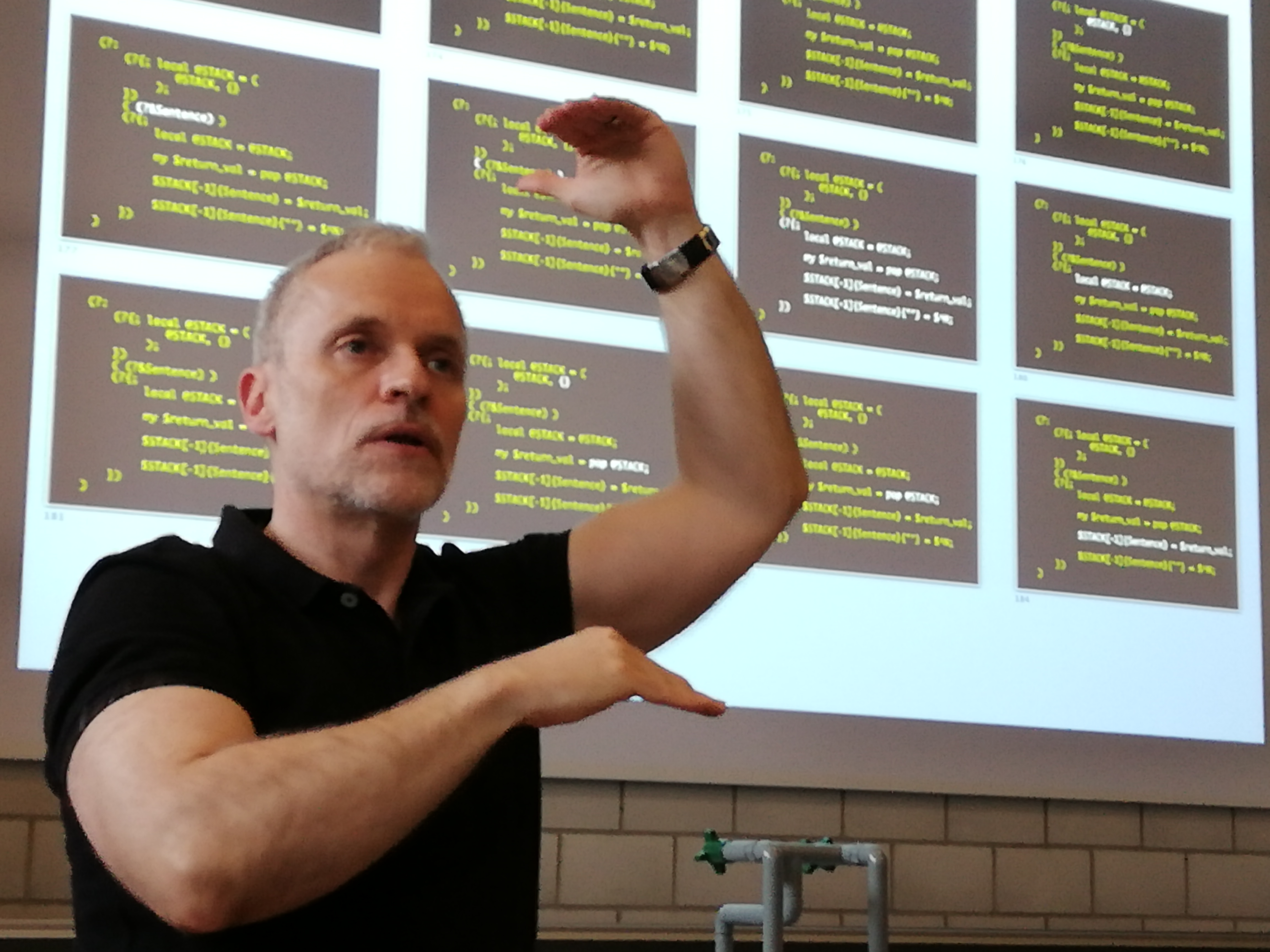 Damian Conway